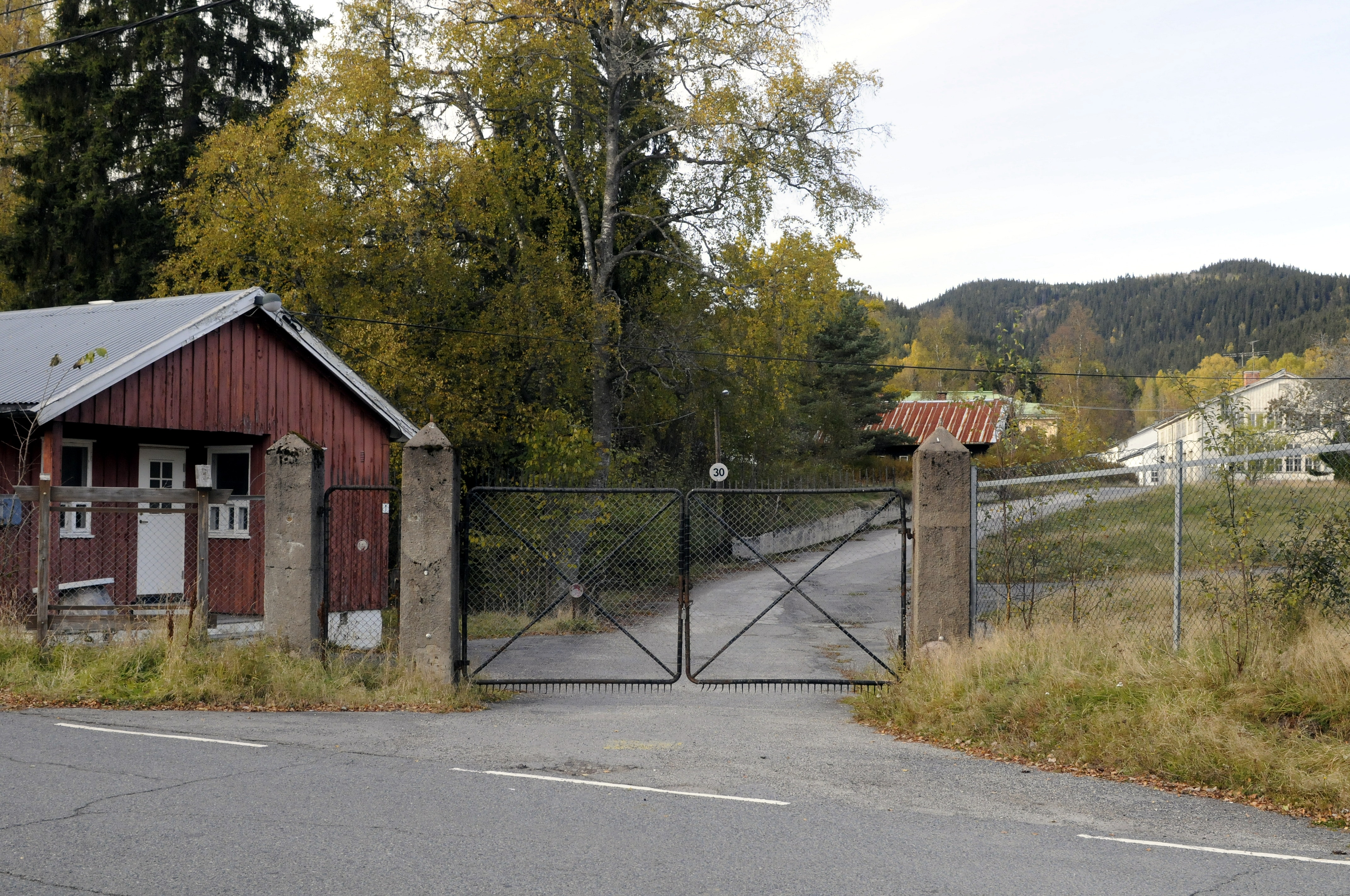 Inngangsporten og portvakten ved Skar leir